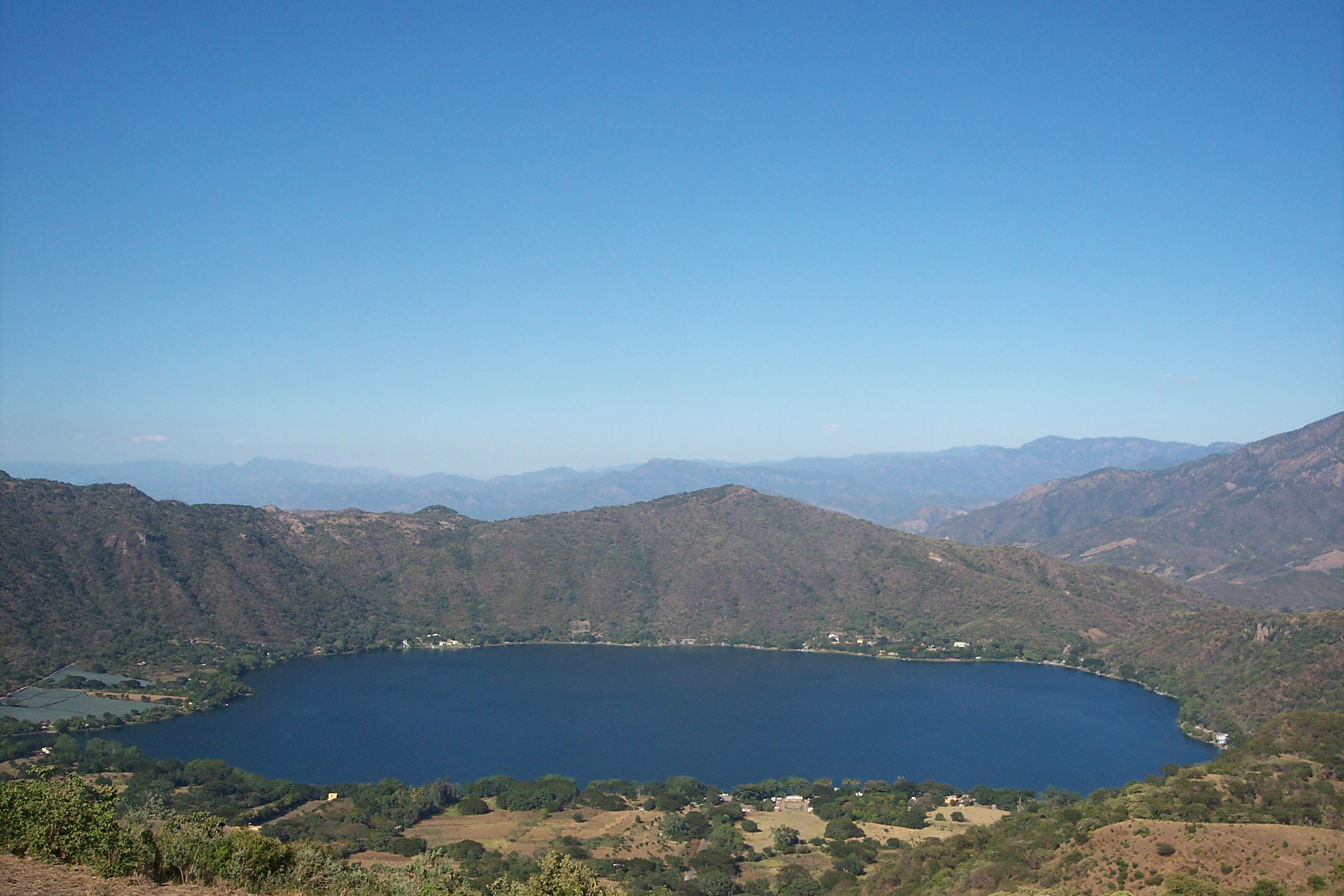 Vista de la laguna de Santa María del Oro en el estado de Nayarit, México